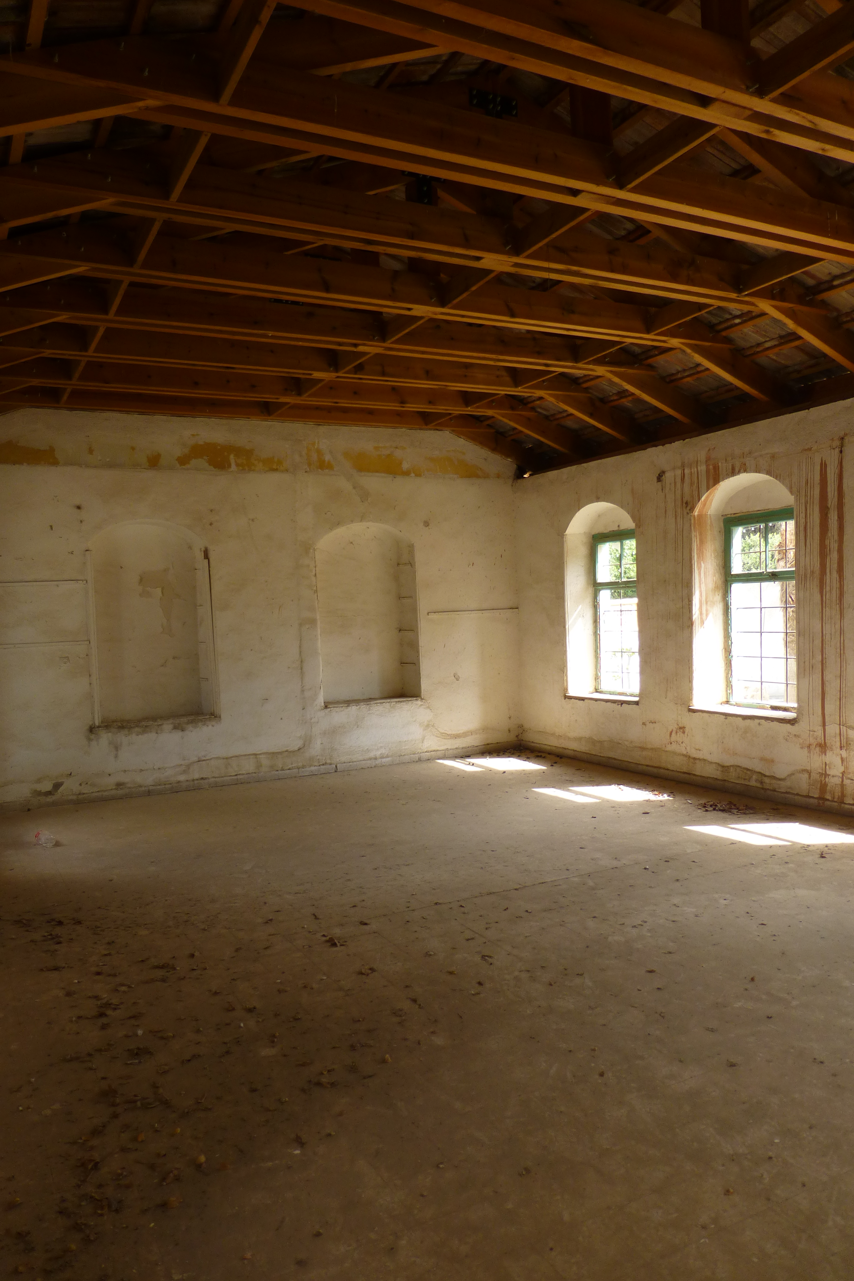 ביתם של מינה בנימין פוקס, מהבתים הראשונים במושבה. מבנה בן קומה שנבנה ב-1888 מאבני כורכר. ב-1970 עבר המבנה לידי "בני ברית" ושימש כמועדון לנוער וקשישים. מ-2004 עומד נטוש ומיועד לשימור כחלק ממתחם המוזיאון לתולדות גדרה.